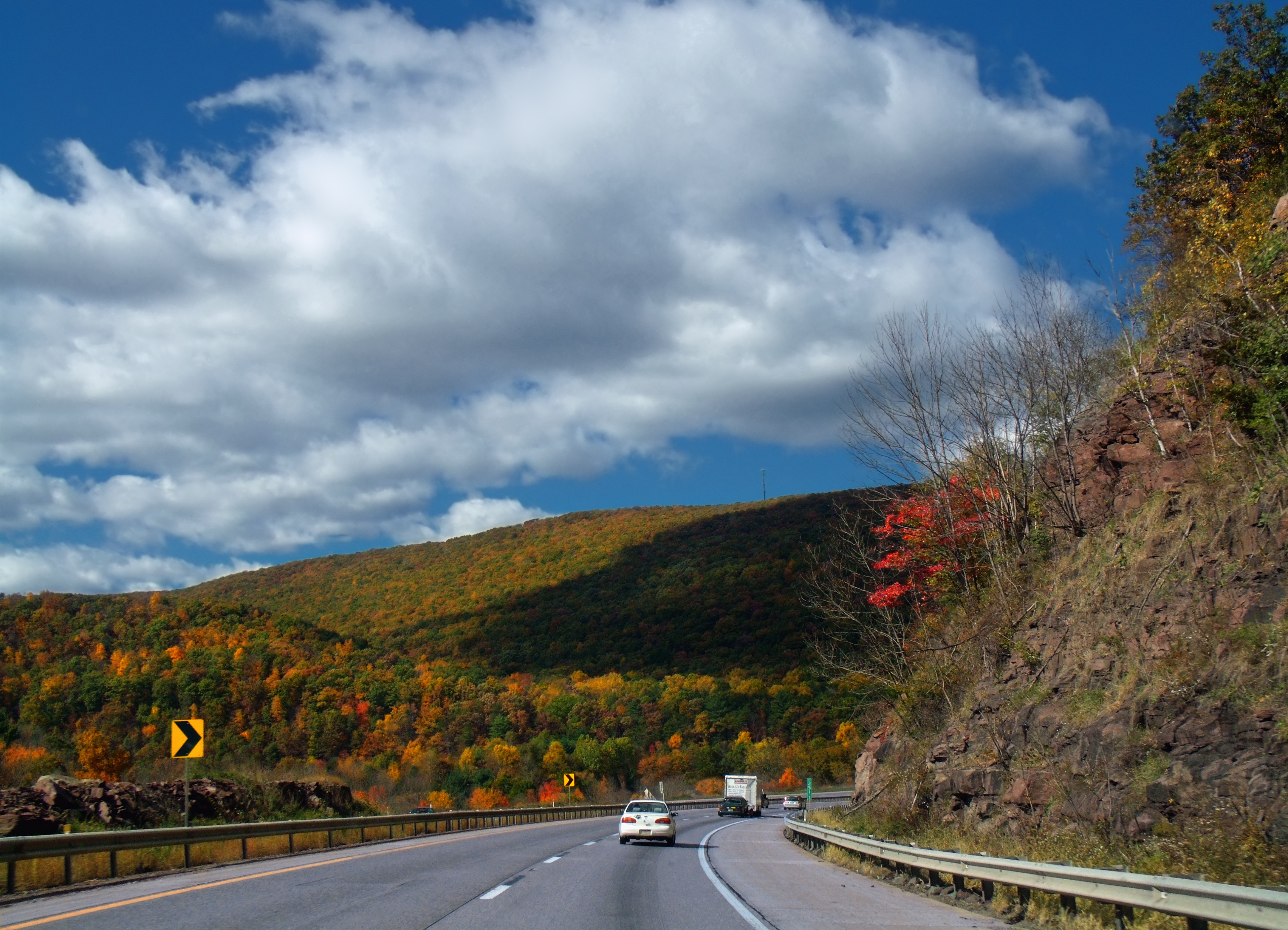 Interstate 80 West, Luzerne County.